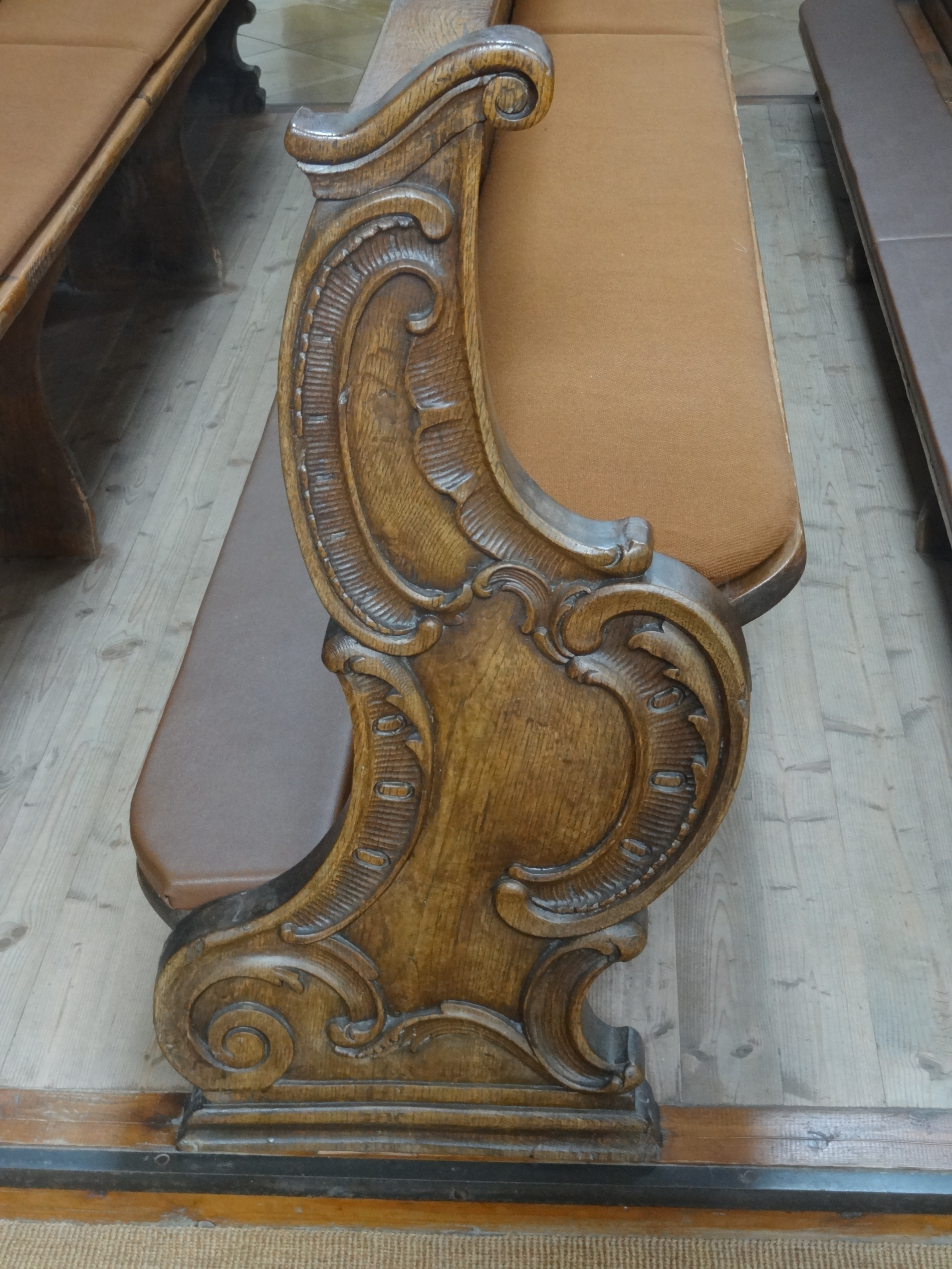 Stuhlwange in der Pfarrkirche St. Martin in Langenpreising (Landkreis Erding, Oberbayern)